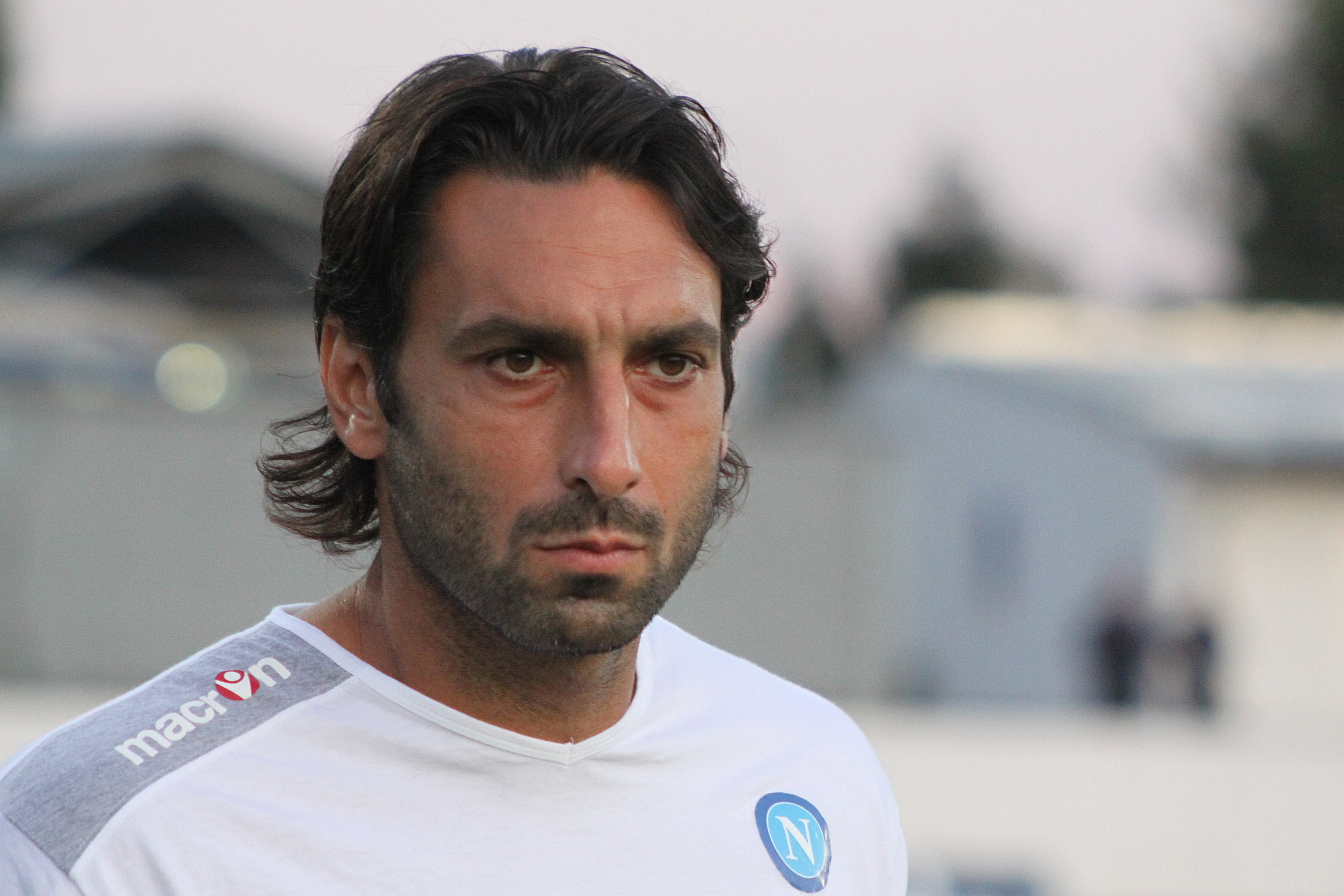 Gennaro Iezzo - SSC Neapel (2) Gennaro Iezzo - Società Sportiva Calcio Napoli